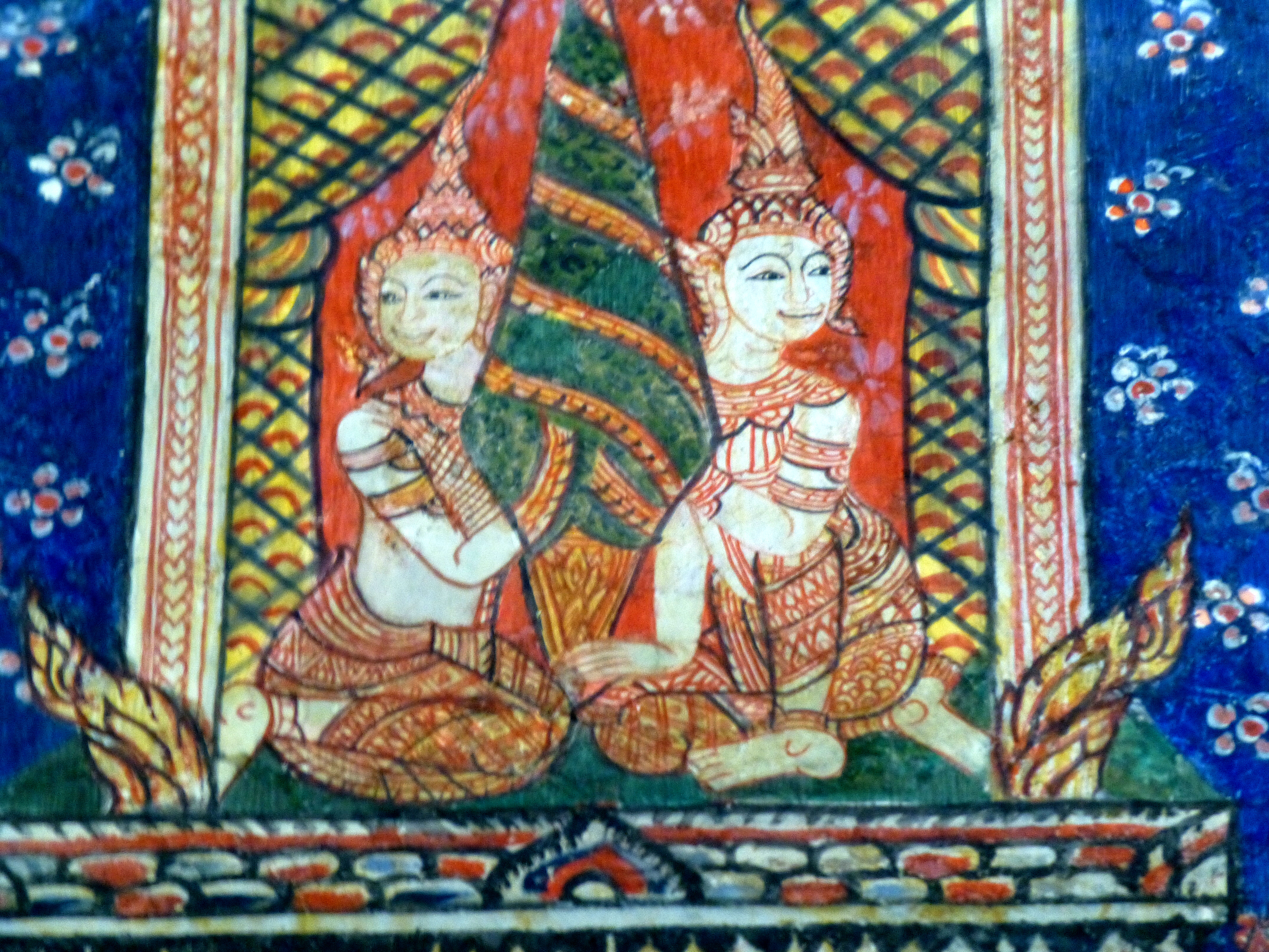 075 Marraige of Suddhodana and Mahapajapati (detail), Wat Kasattrathirat, Ayutthaya